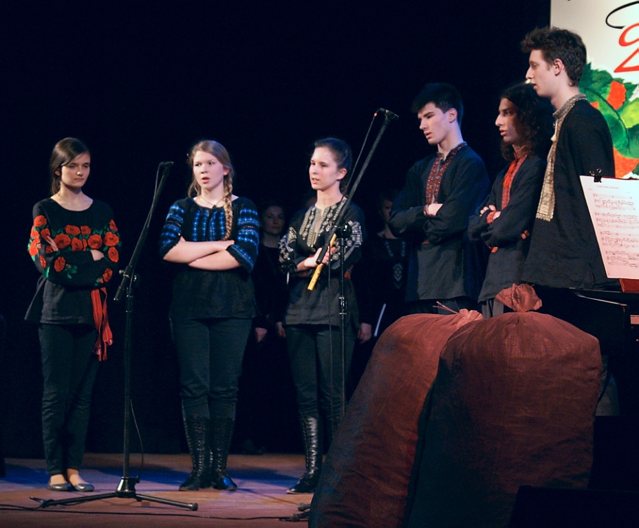 Krajka